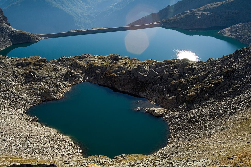 Přehradní jezera ve Vysokých Taurech